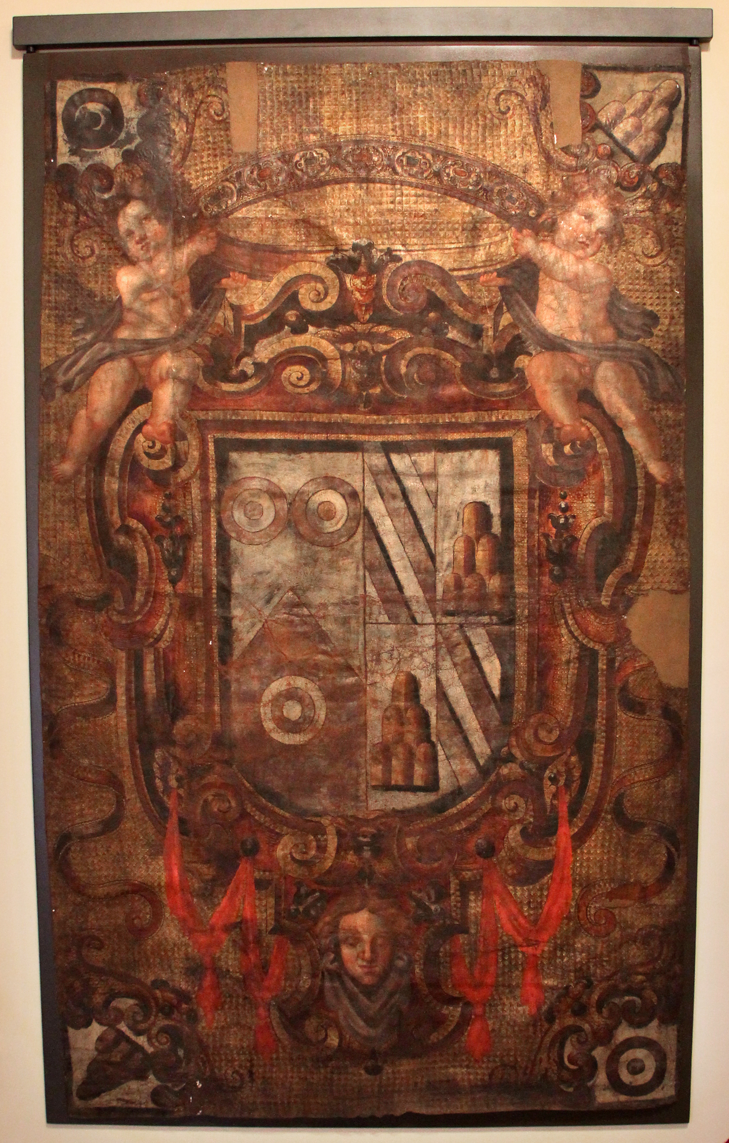 Villa medicea di Cerreto Guidi - MIBAC The making of this document was supported by Wikimedia CH. (Submit your project!) For all the files concerned, please see the category Supported by Wikimedia CH. This is a photo of a monument which is part of cultural heritage of Italy.